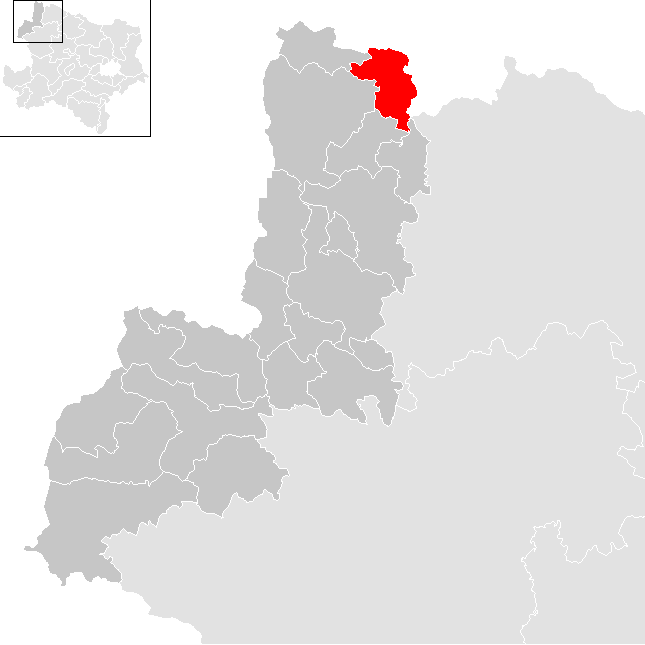 Bezirk Gmünd